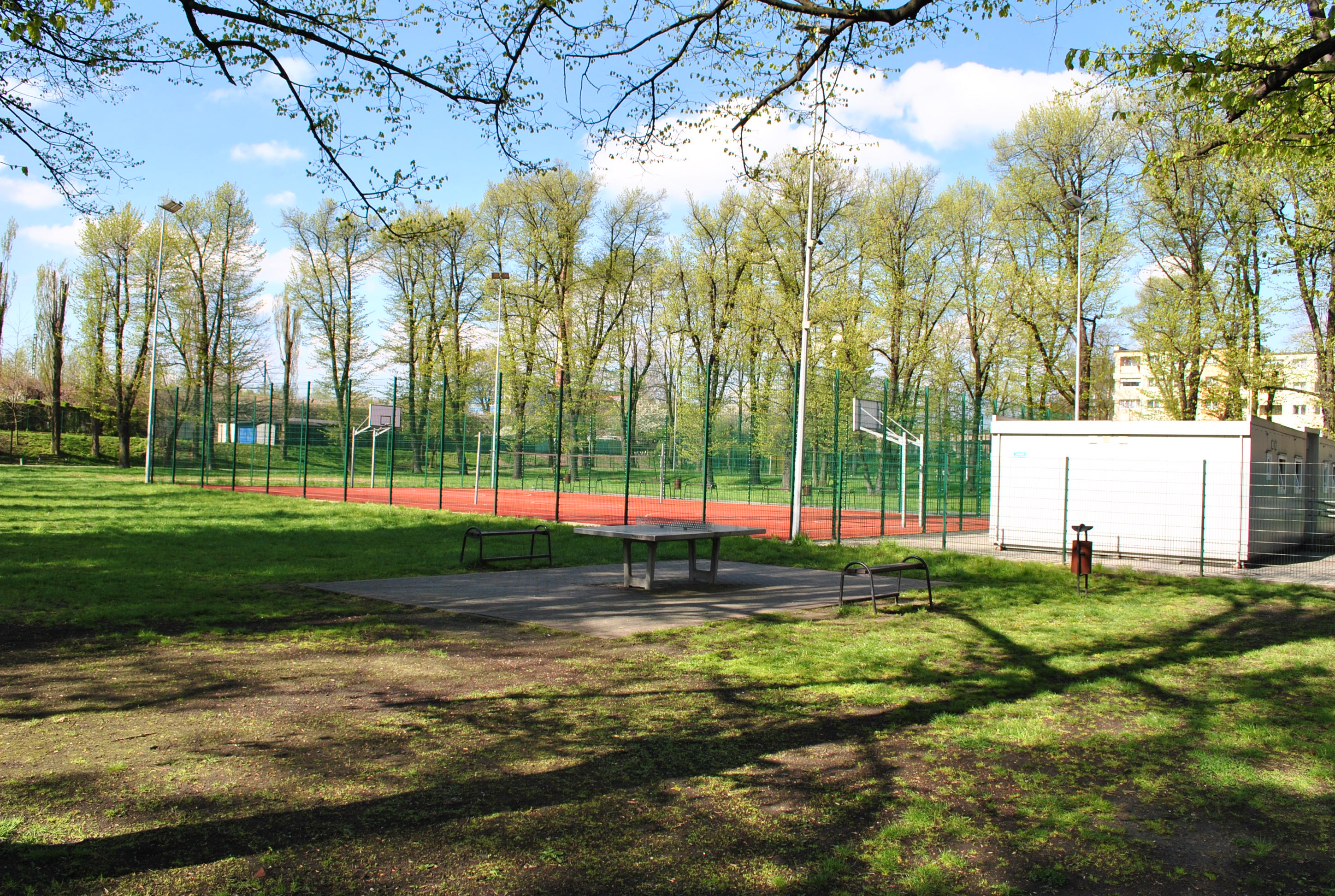 Katowice - Załęże. Kompleks sportowy przy Parku Załęskim